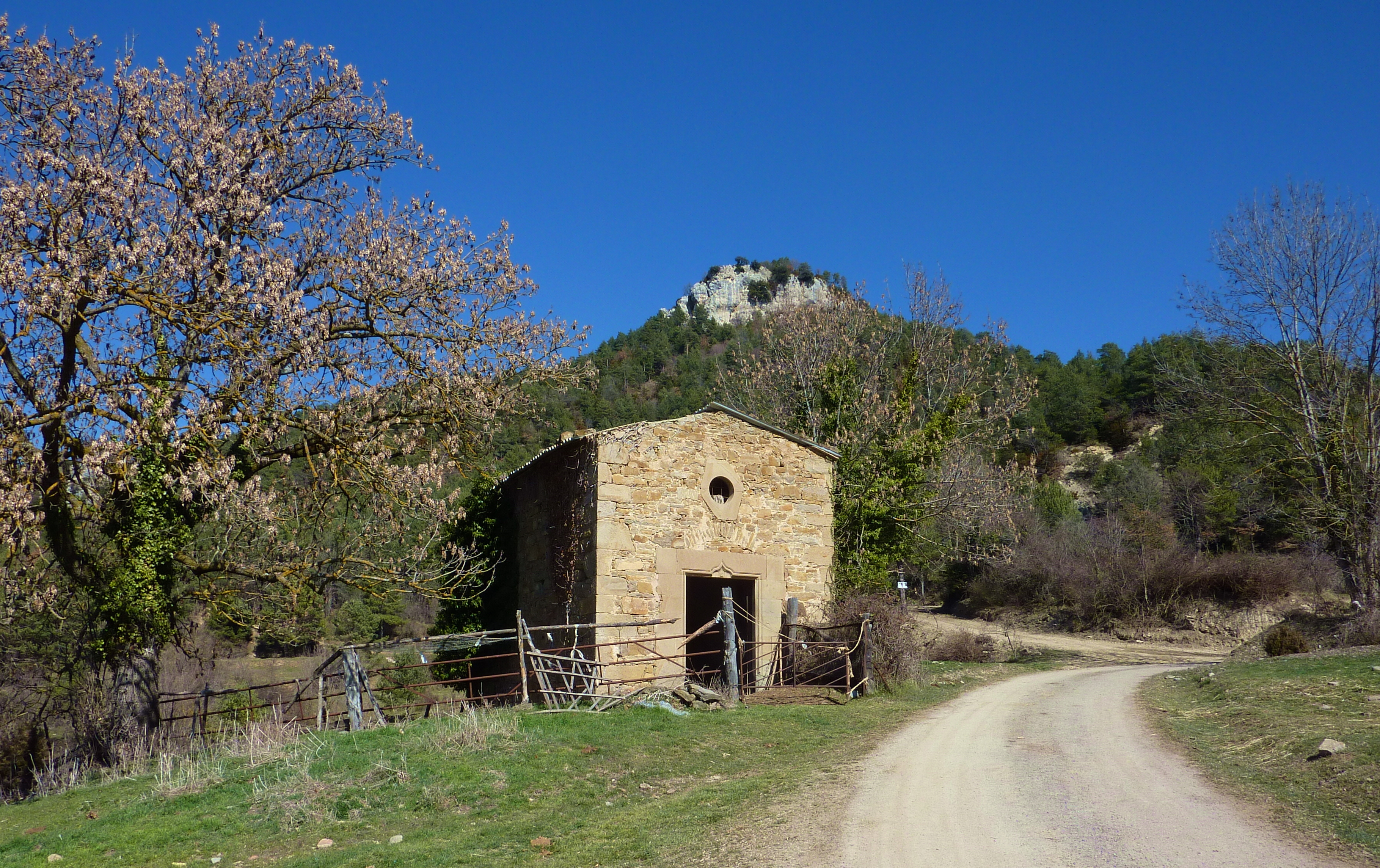 Capella de la Mercè (Borredà)